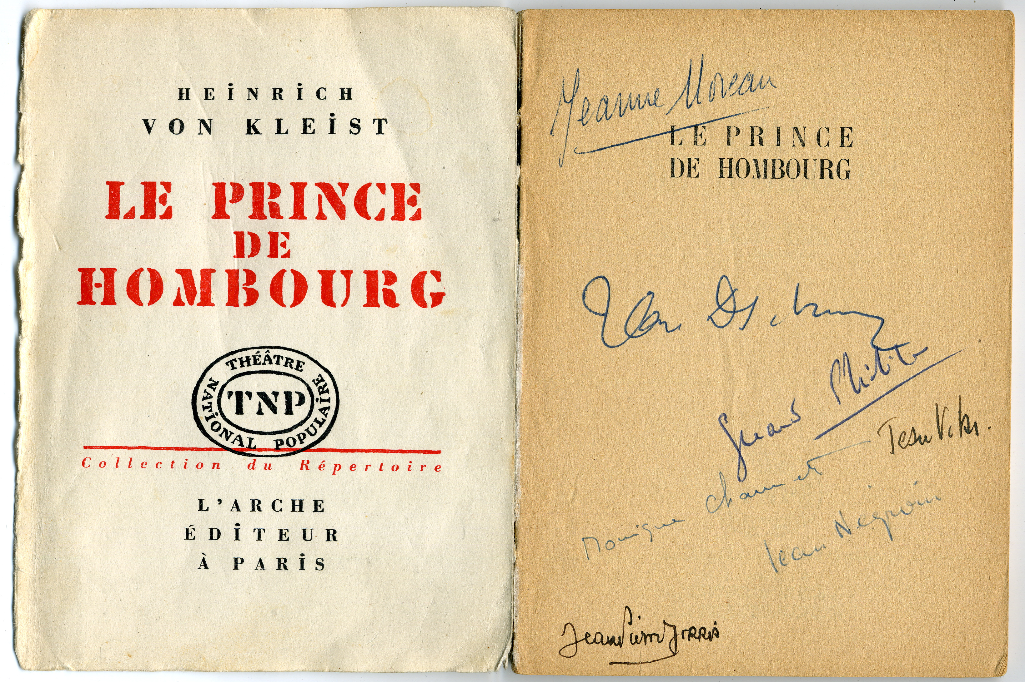 Le Prince de Hombourg, de Heinrich von Kleist. traduction de Jean-Louis Curtis, mise en scène de Jean Vilar, Cour d'honneur du Palais des papes, première le 18 juillet 1952 (reprise du spectacle créé en 1951), 2 représentations. avec : André Schlesser (le serviteur de scène), Gérard Philipe (prince Frédéric Arthur de Hombourg), (autographe) Jean Negroni (comte de Hohenzollern), (autographe) Jean Vilar (Frédéric Guillaume), (autographe) Lucienne Le Marchand (princesse électrice), Jeanne Moreau (Nathalie), (autographe) René Belloc (un heiduque), Jean Deschamps (feld-maréchal Dörfling), (autographe) Lucien Arnaud (Hennings), Jacques Buttin (Guelder), Jacques Amyriam (capitaine von der Goltz), Jean-Paul Moulinot (colonel Kottwitz), Daniel Sorano (1 er officier), Etienne de Swarte (officier), Michel Petit (2e officier), Charles Denner (Siegfried von Mörner), Monique Chaumette (une dame de la Cour), (autographe) Maurice Coussonneau (maréchal des logis) (Stranz), Jean Leuvrais (comte Reuss) (comte Sparren) et Françoise Spira (2ème dame de la Cour) Décor: Léon Gischia Costumes: Léon Gischia Musique: Maurice Jarre Régie générale: René Besson Construction du décor: Camille Demangeat Collaboration à la régie: Maurice Coussonneau Lumières: Pierre Saveron Réalisation costumes: Alyette Samazeuilh et Henri Lebrun P.S. : Jean-Pierre Jorris, (autographe), n'a pas joué en 1952 Le Prince de Hombourg, mais Lorenzaccio d'Alfred de Musset; son autographe a été obtenu à l'issue de cette représentation.